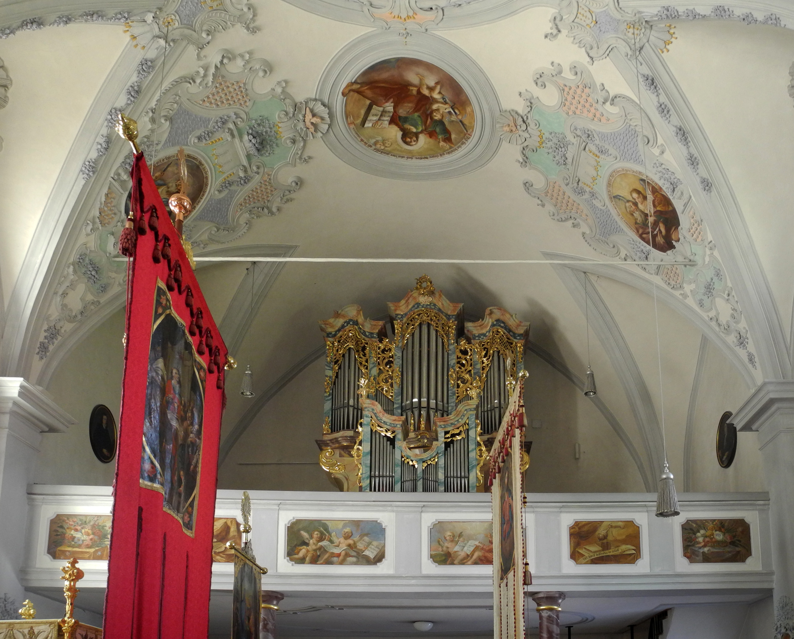 Orgelempore der kath. Pfarrkirche Mariä Geburt in Mieders im Stubaital, Kirchgasse 3